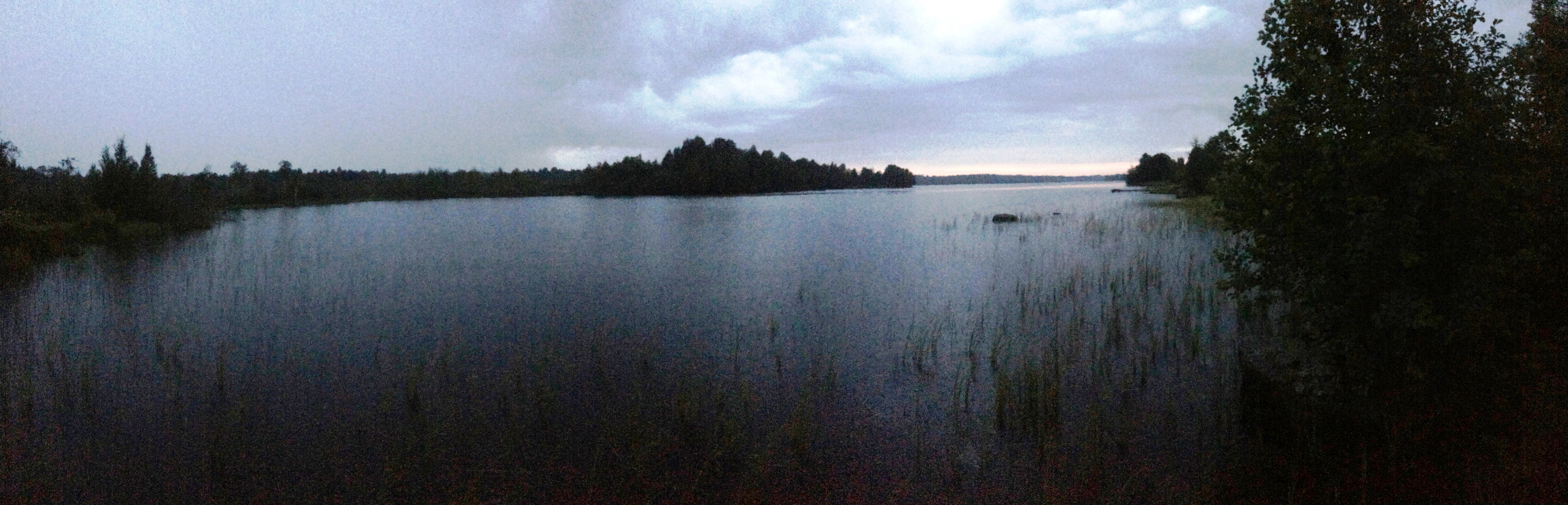 Сергозеро (озеро, Карелия)